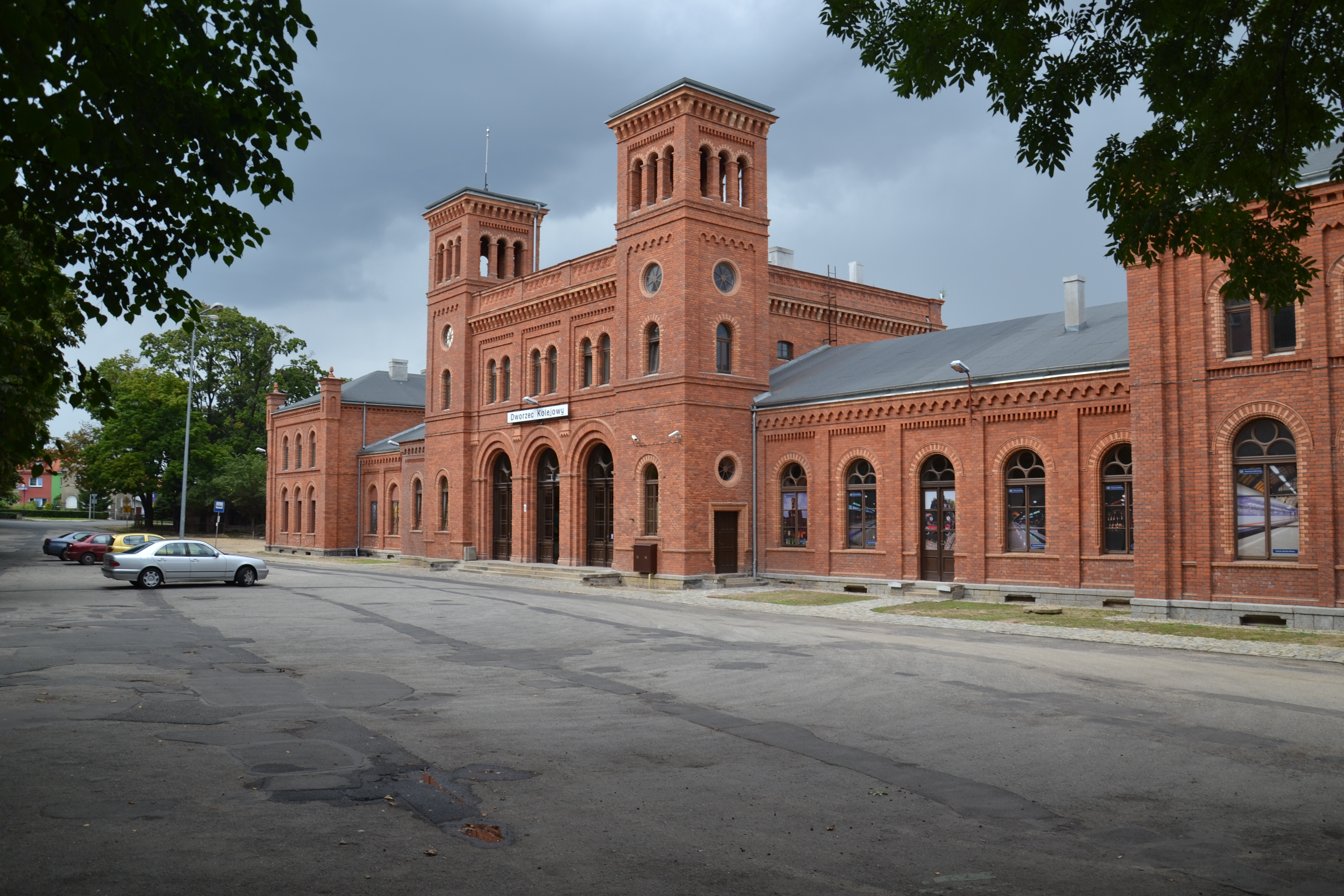 Widok na dworzec kolejowy w Świebodzicach od strony miasta